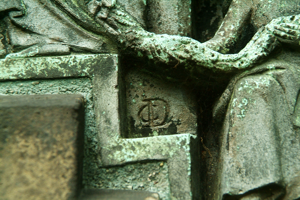 Künstlersignatur "CD" (Carl Dopmeyer ? am rückseitigen Trauerrelief des Grabmals von Friedrich Krancke ...